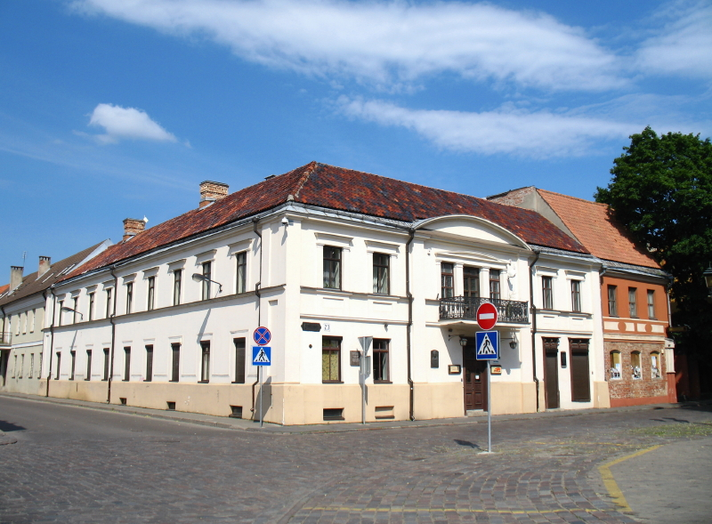 Kauno senamiestis. Saliamono Banaičio spaustuvė